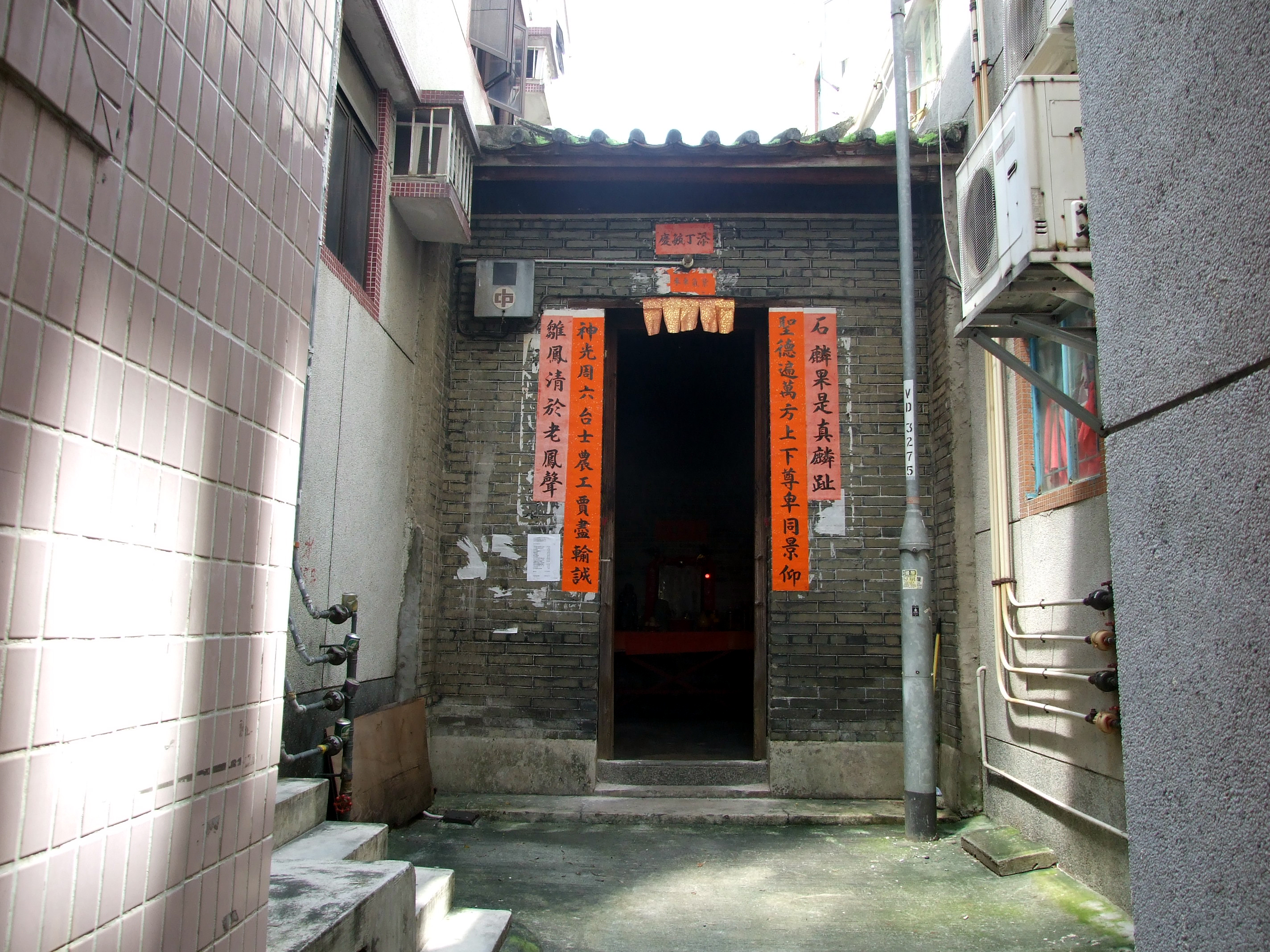 新界元朗橫洲水邊村神廳